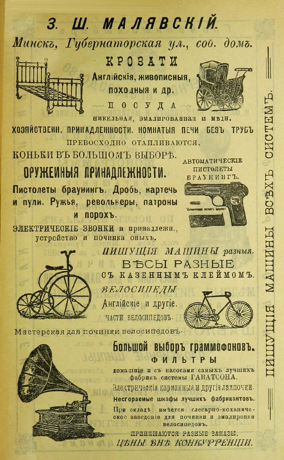 З. Ш. Малявский.